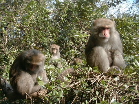 La population de macaques de Formose, Macaca cyclopis du Mont Longevity à Taïwan. Photographie de Minna J. Hsu avec son aimable autorisation.